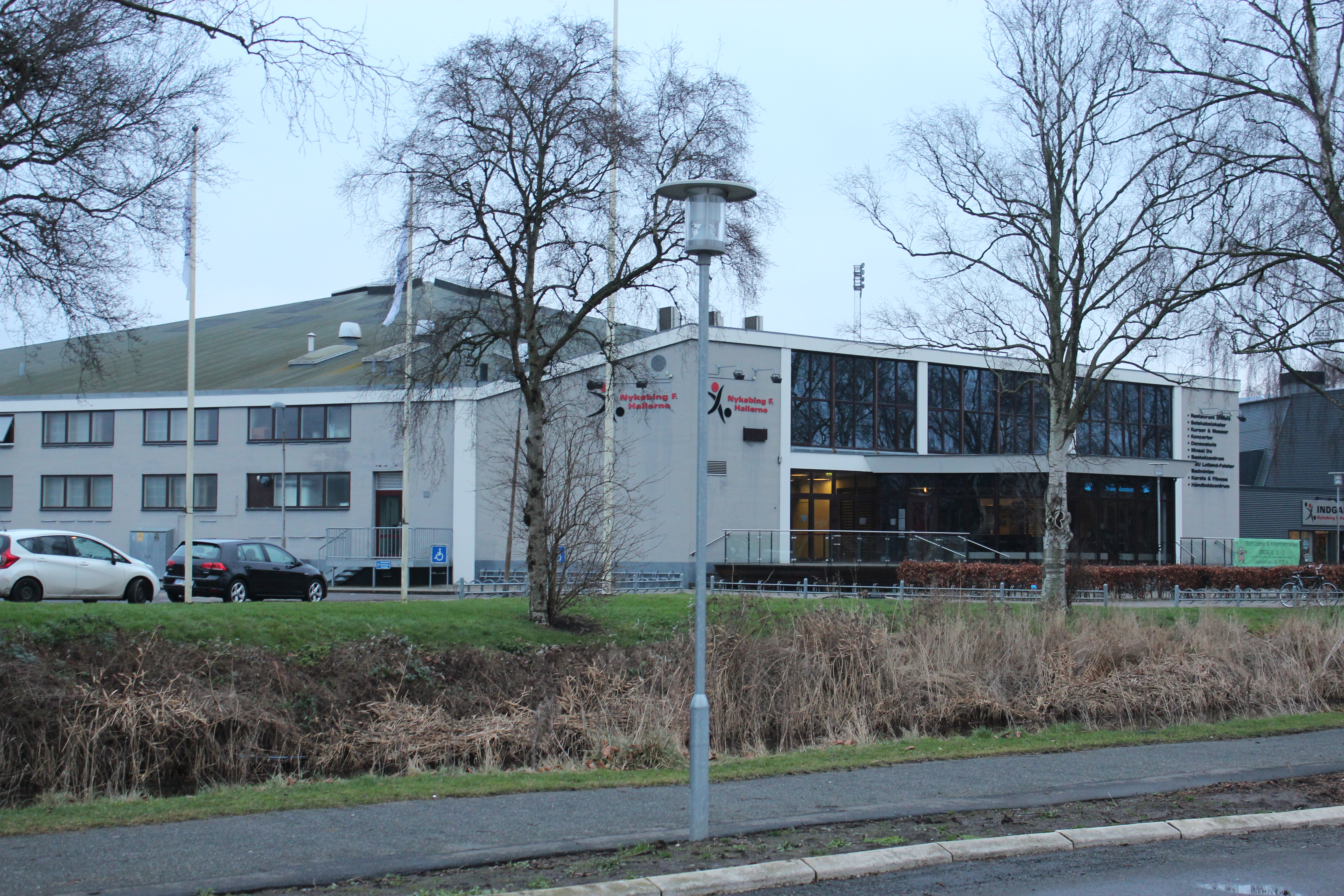 Nykøbing F. Hallen er hjemmebane for bl.a. Nykøbing Falster Håndboldklub